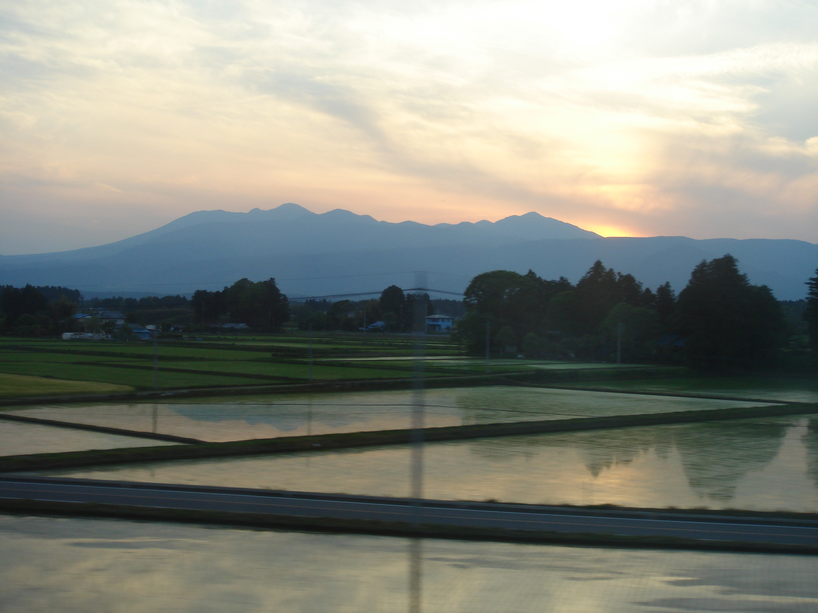 稿者撮影、夕暮れの高原山、2007年5月24日撮影